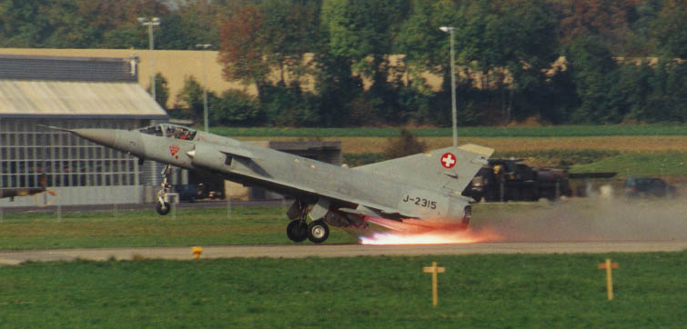 Start einer mirage3s mit jato inpayerne (1996)